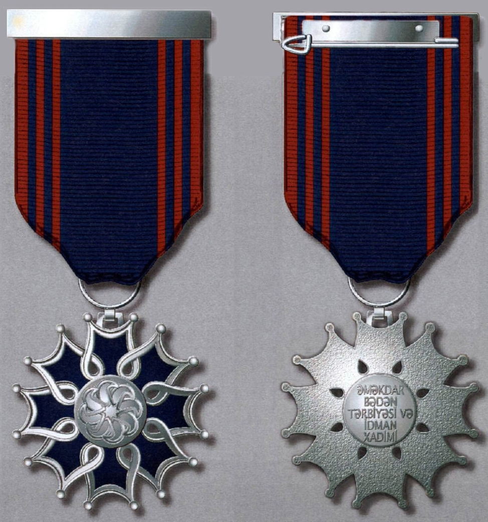 “Əməkdar bədən tərbiyəsi və idman xadimi” fəxri adının döş nişanı